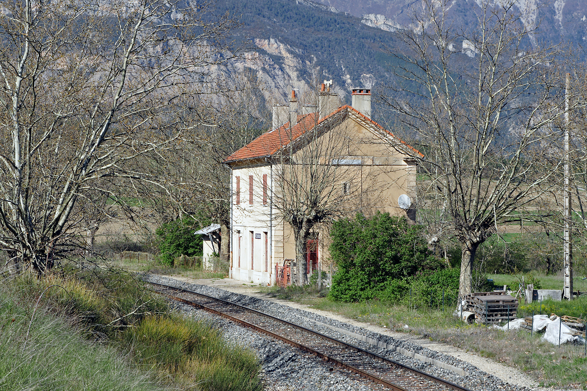 L'ancienne gare de Recoubeau (Drôme) - Ligne de livron à Aspres-sur-Buëch